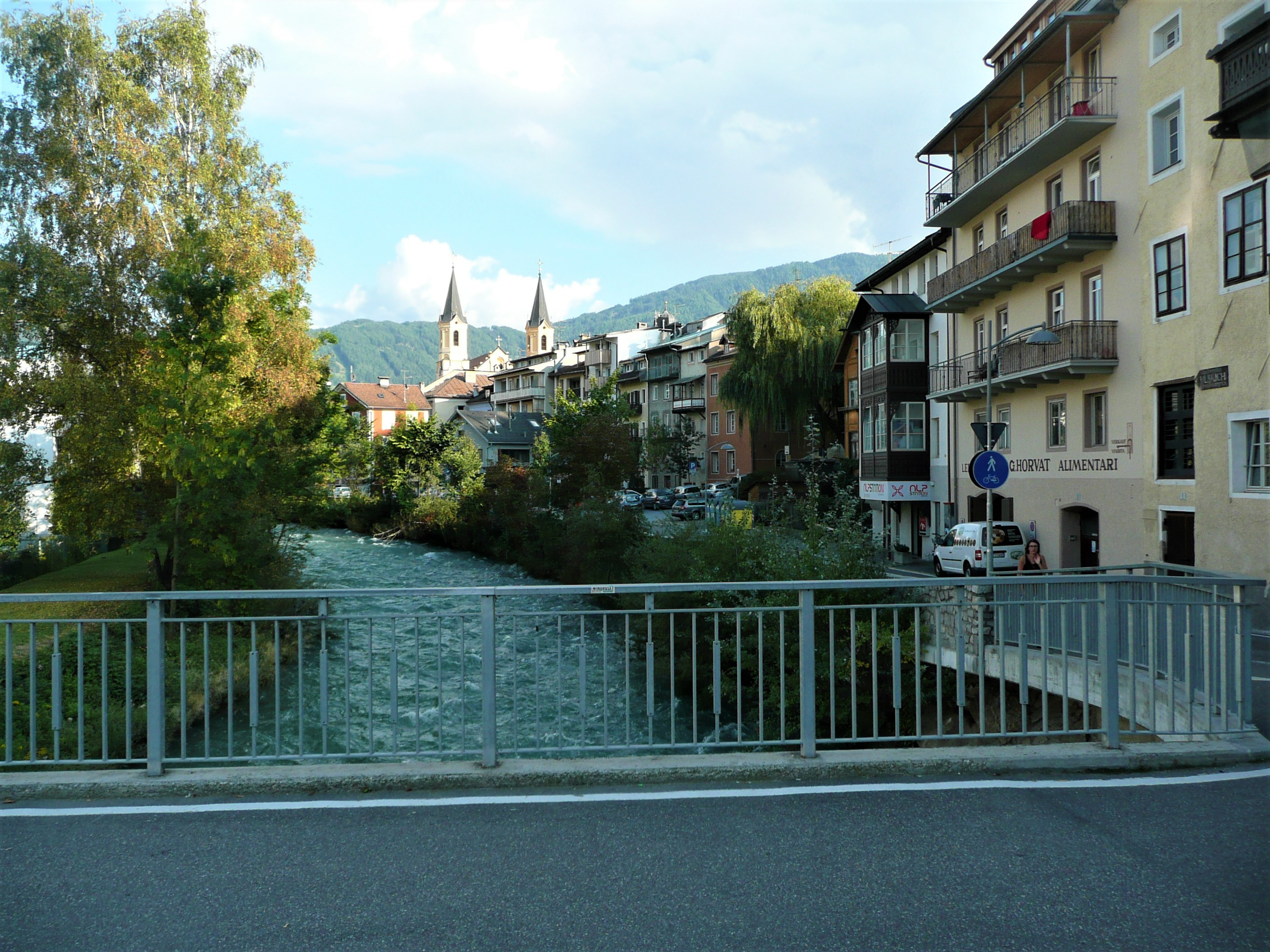 Rienz mit Frauenkirche im Hintergrund in Bruneck